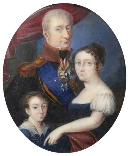 Граф Леонтий Леонтьевич Беннигсен с женой Екатериной Фадеевной (1775—1858) и сыном Александром.